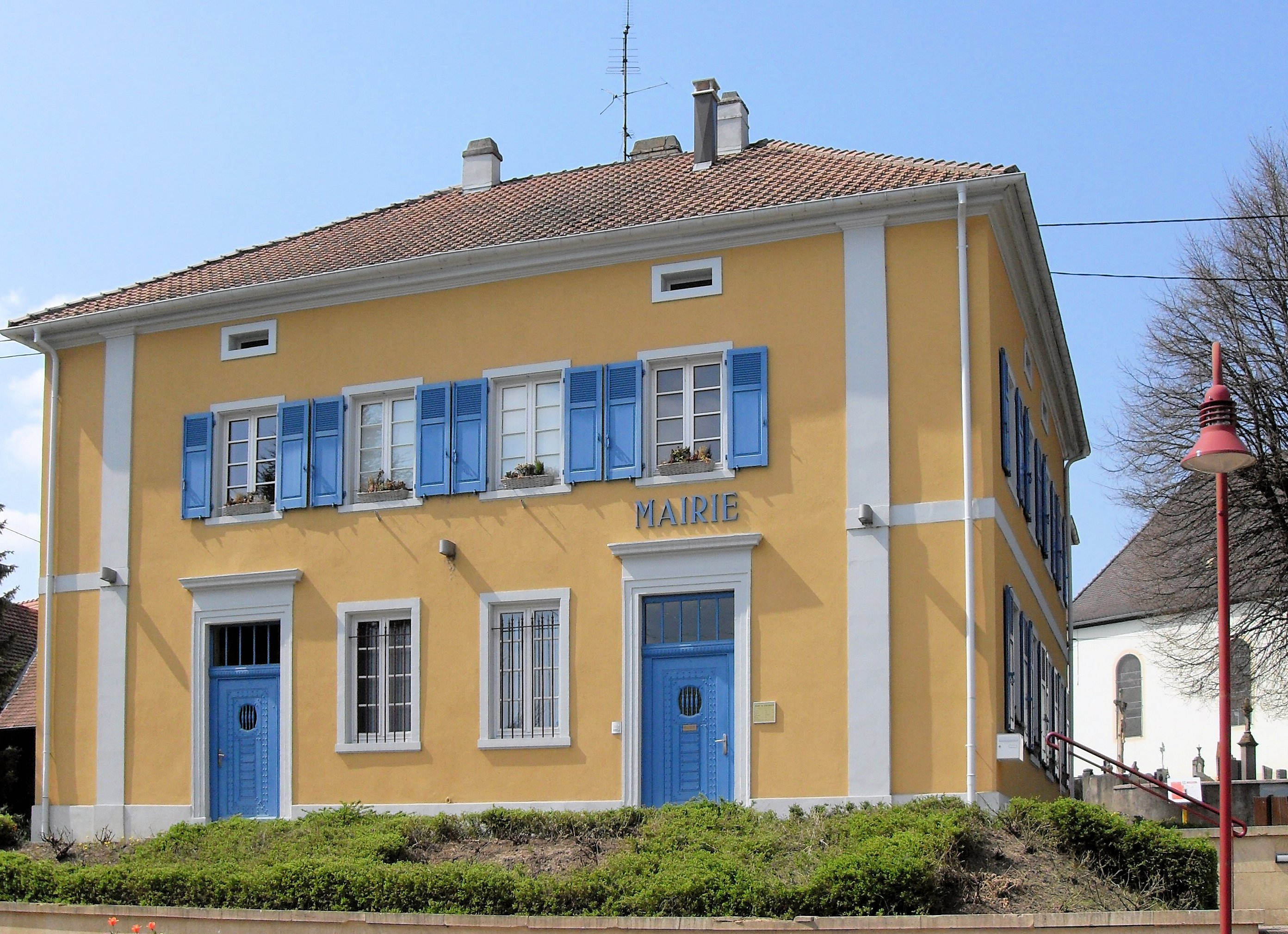 La mairie de Schlierbach